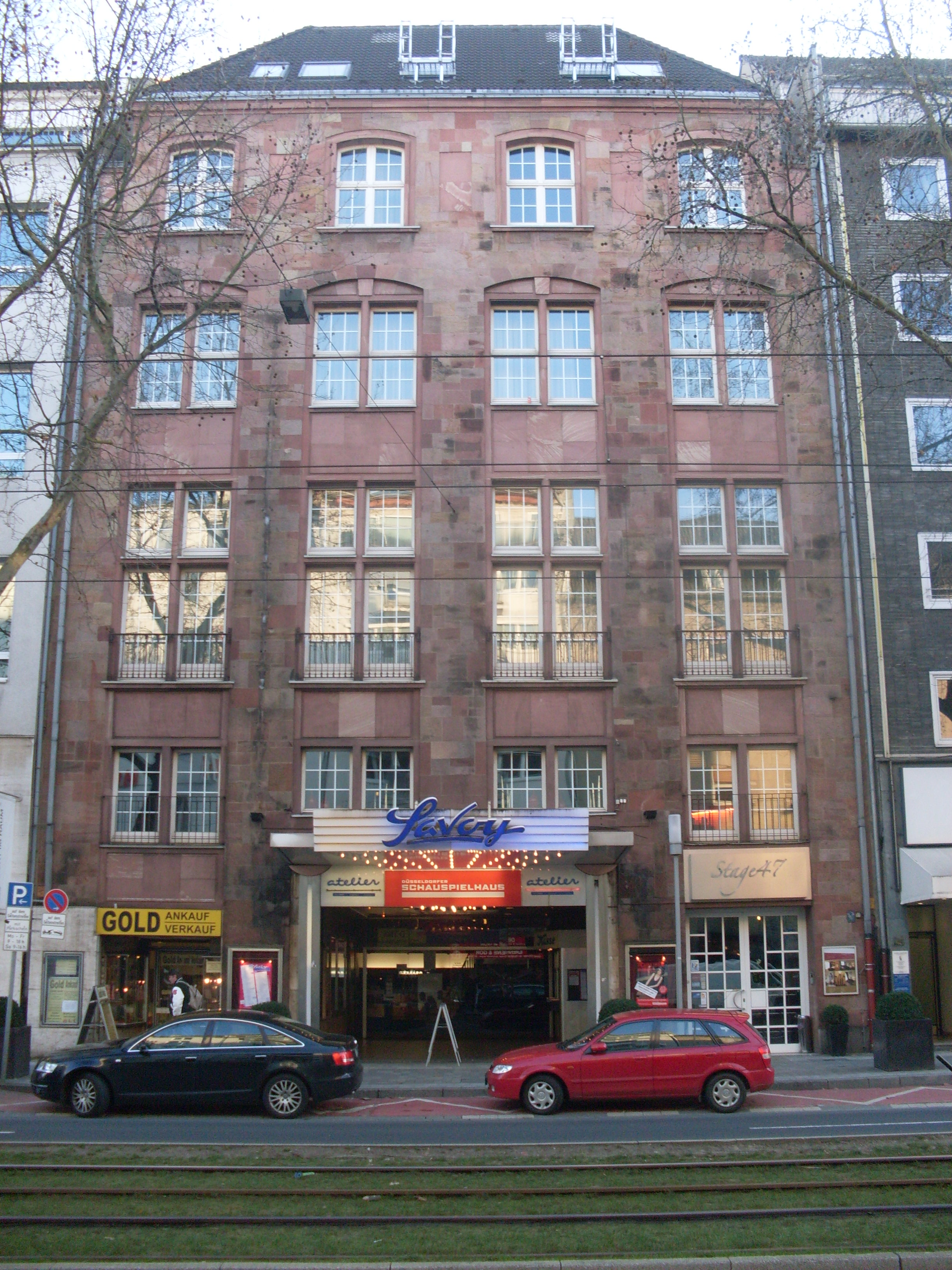 Düsseeldorf Savoy-Theater, ehemalige Industrie & Handelskammer